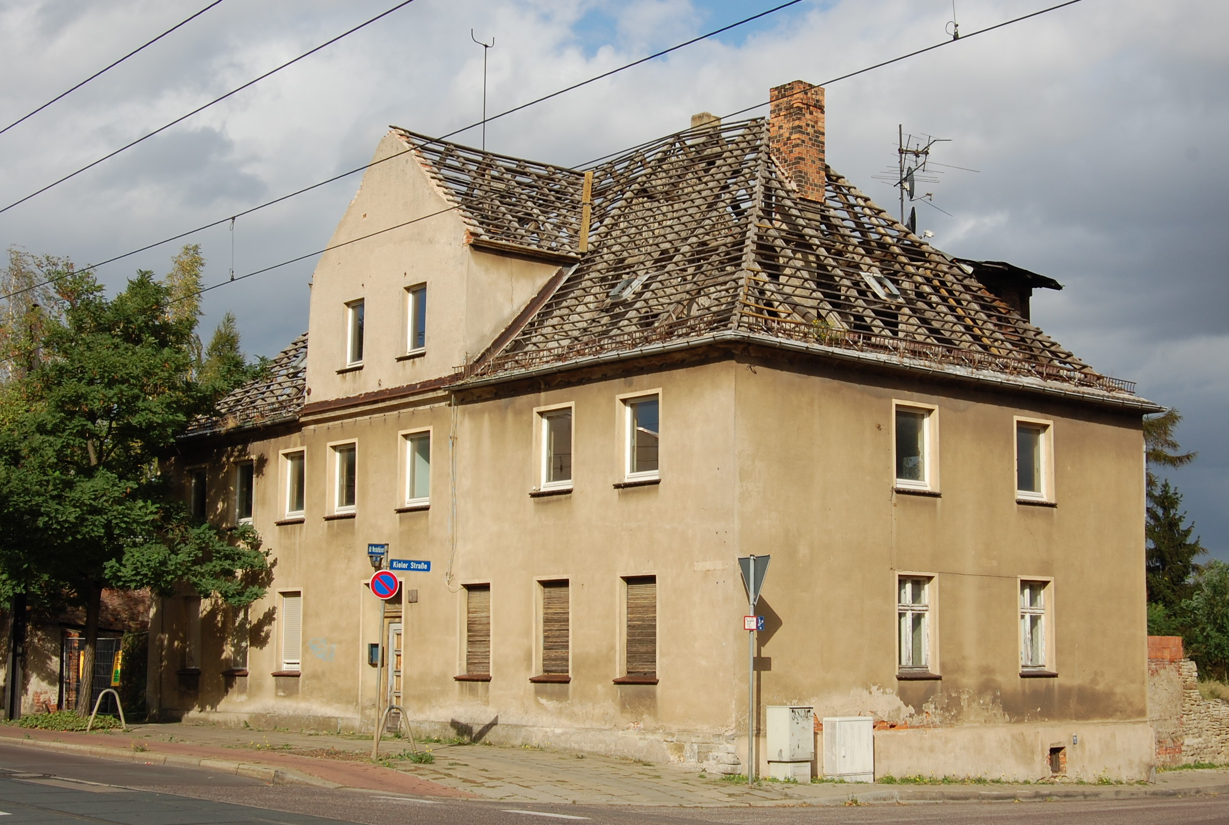 ehemaliges Gasthaus "Goldenes Schiff" in Magdeburg-Westerhüsen